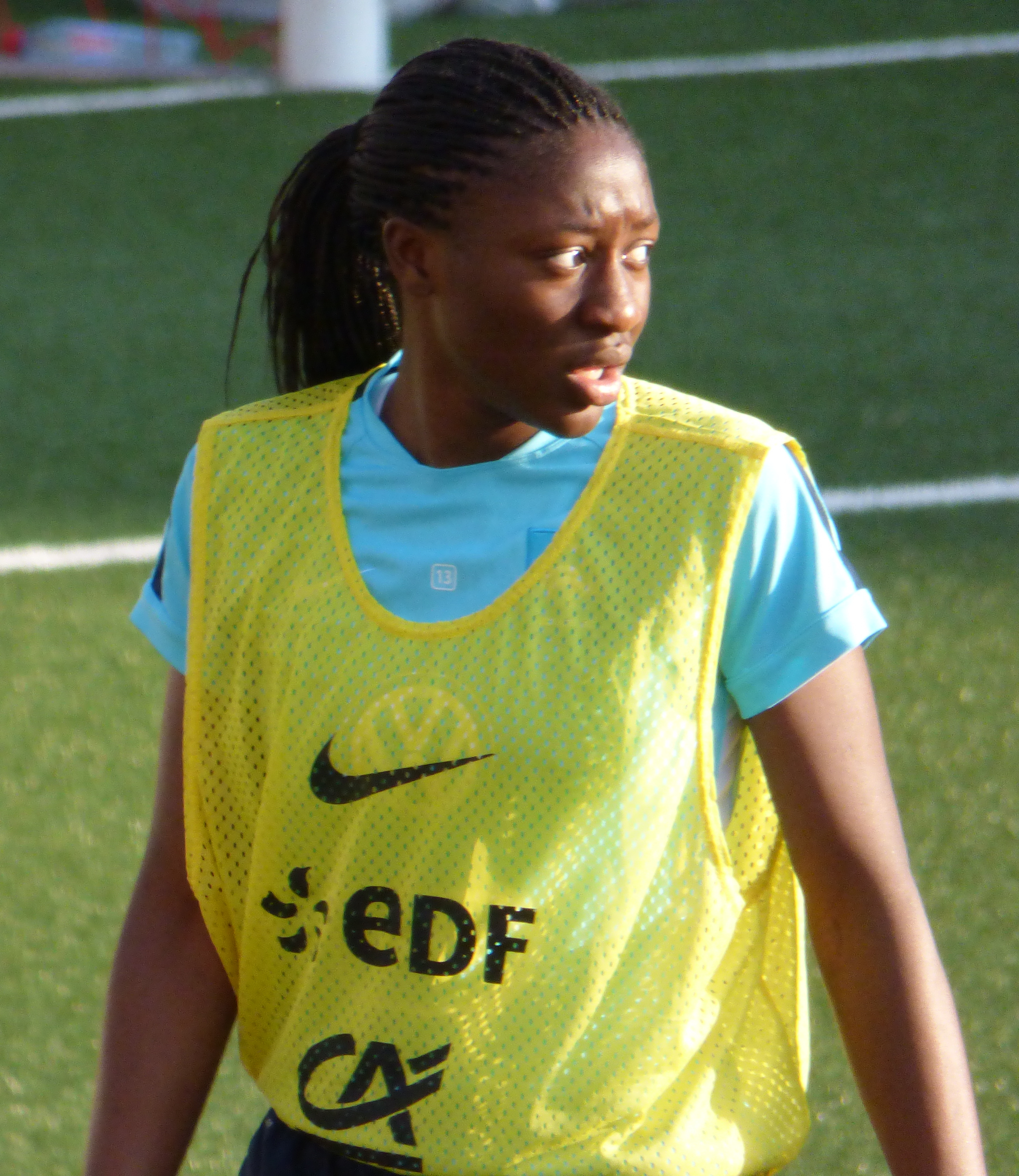 Equipe de france de FOOTBALL FEMININ à l'entrainement en préparation du MATCH FRANCE ECOSSE du 28 MAI 2015